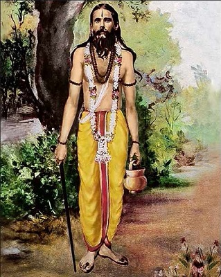 shreemat sadguru padmnabhacharya swami maharaj